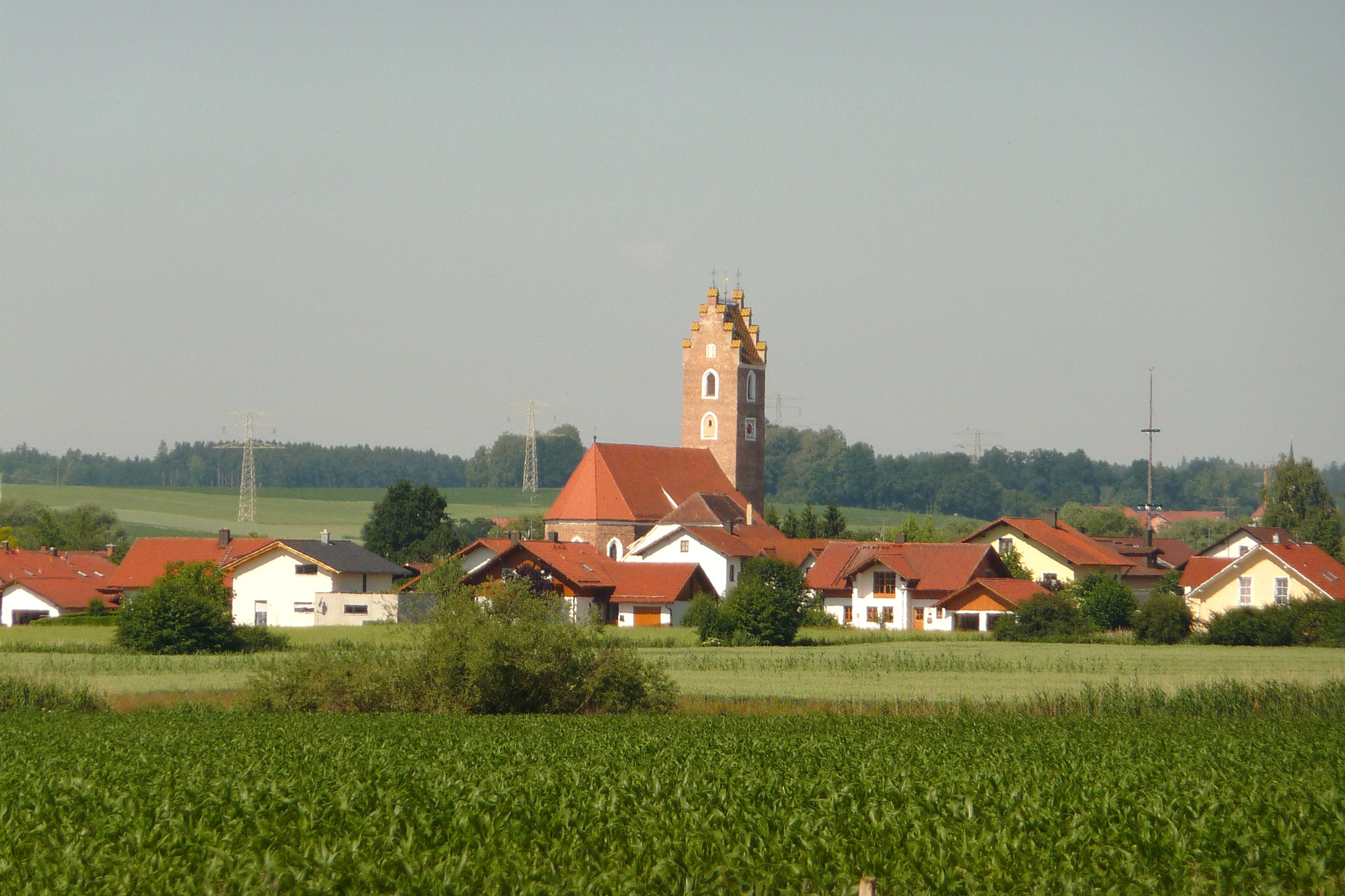 Blick auf Oberdietfurt mit der Pfarrkirche St. Johannes der Täufer